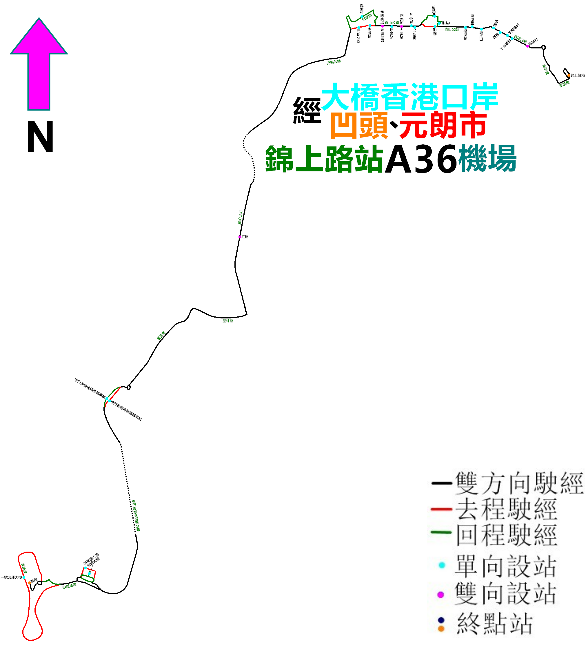 中文（香港）: 龍運巴士A36線的走線圖